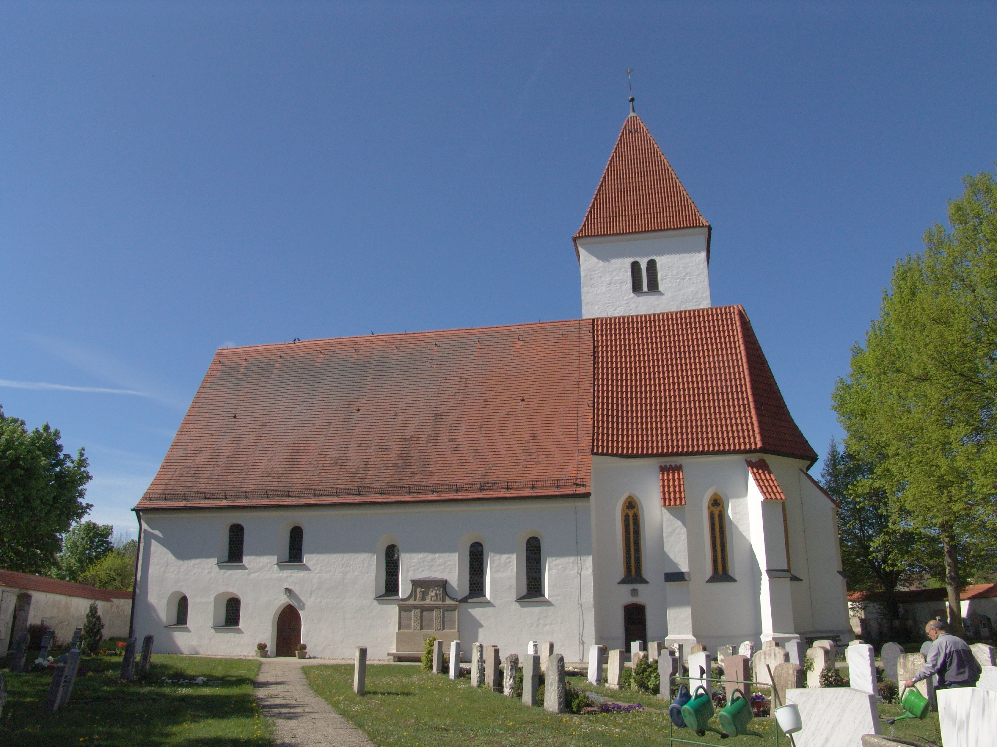 evang.-luth. Kirche St. Michael in Löpsingen